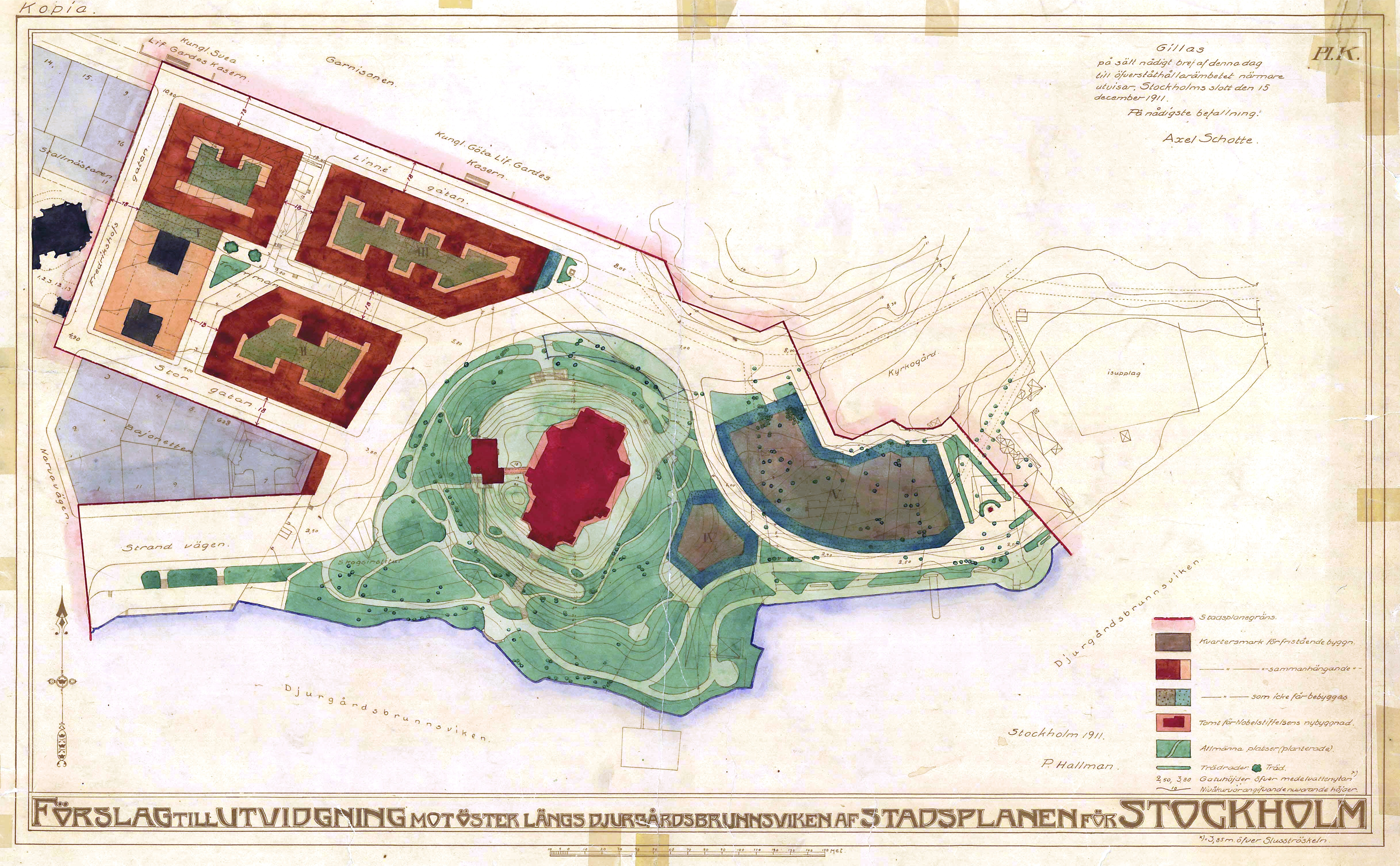 P O Hallmans "Förslag till utvigning mot öster längs Djurgårdsbrunnsviken af Stadsplanen för Stockholm"